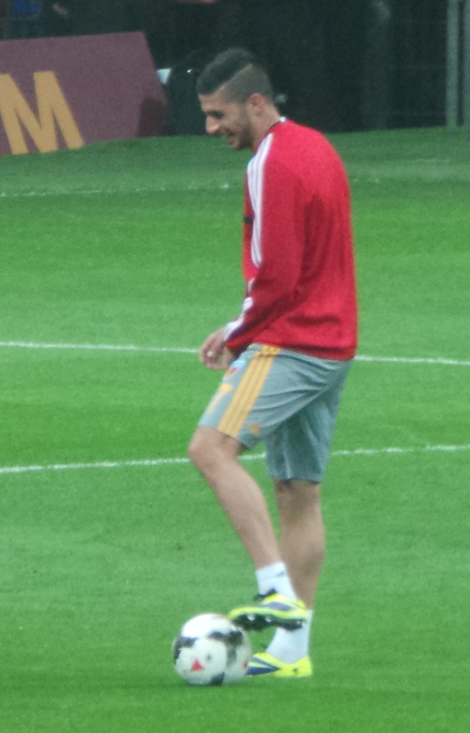 Erdal Akdarı